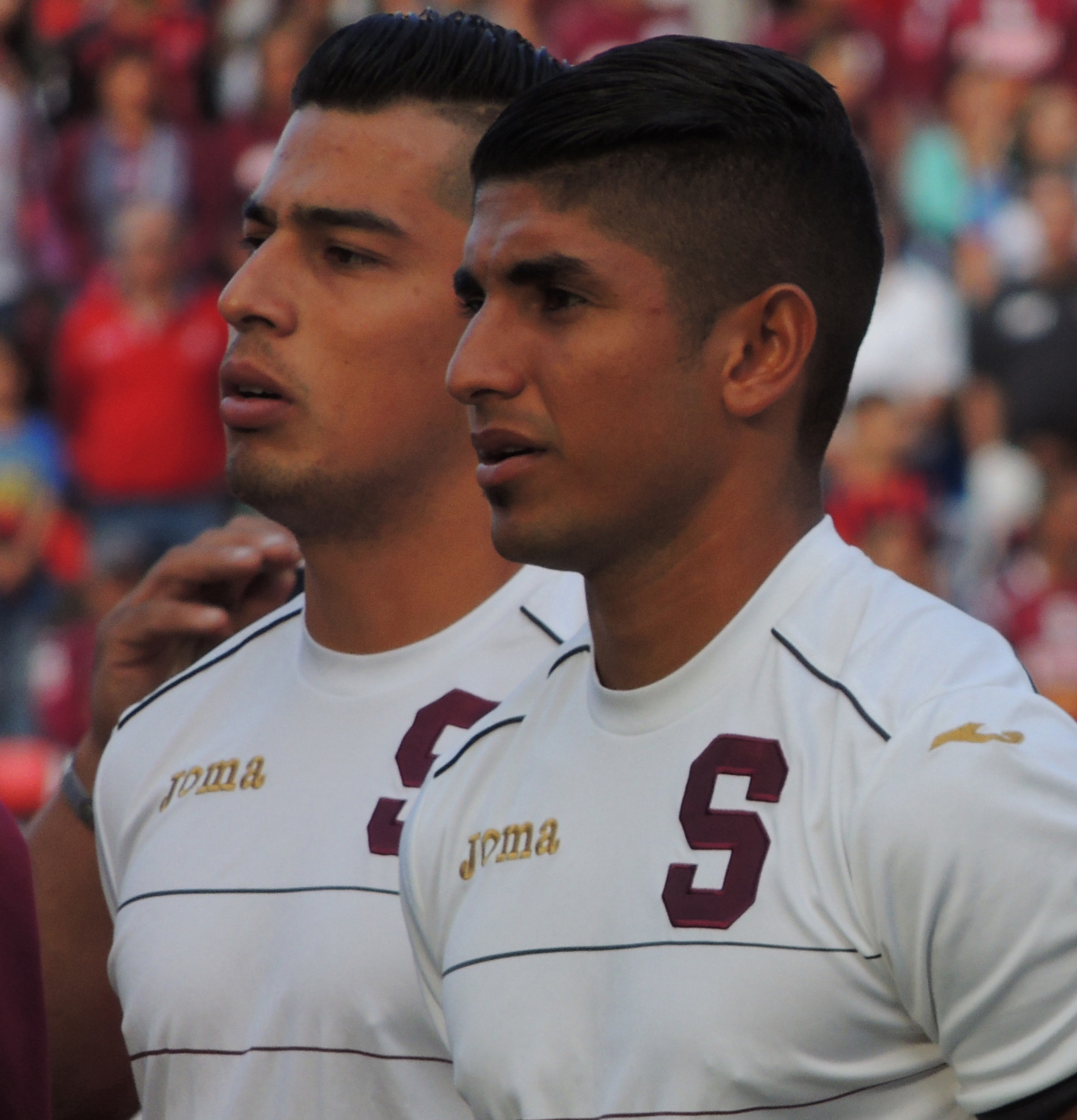 Esta obra de Luis Manuel Madrigal está bajo una licencia de Creative Commons Reconocimiento-CompartirIgual 4.0 Internacional. Para una versión sin logo escriba a